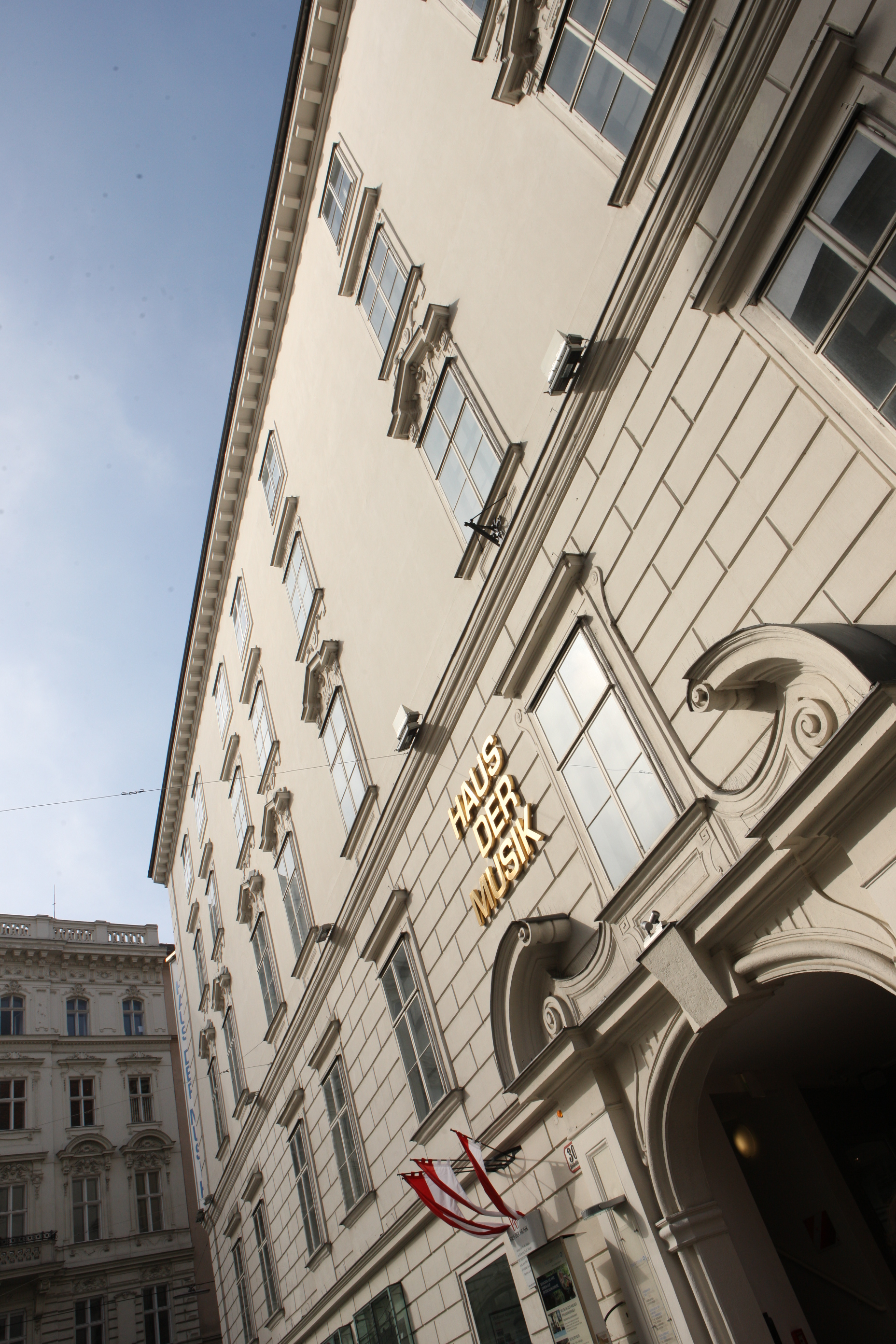 Das Haus der Musik in der Wiener Innenstadt